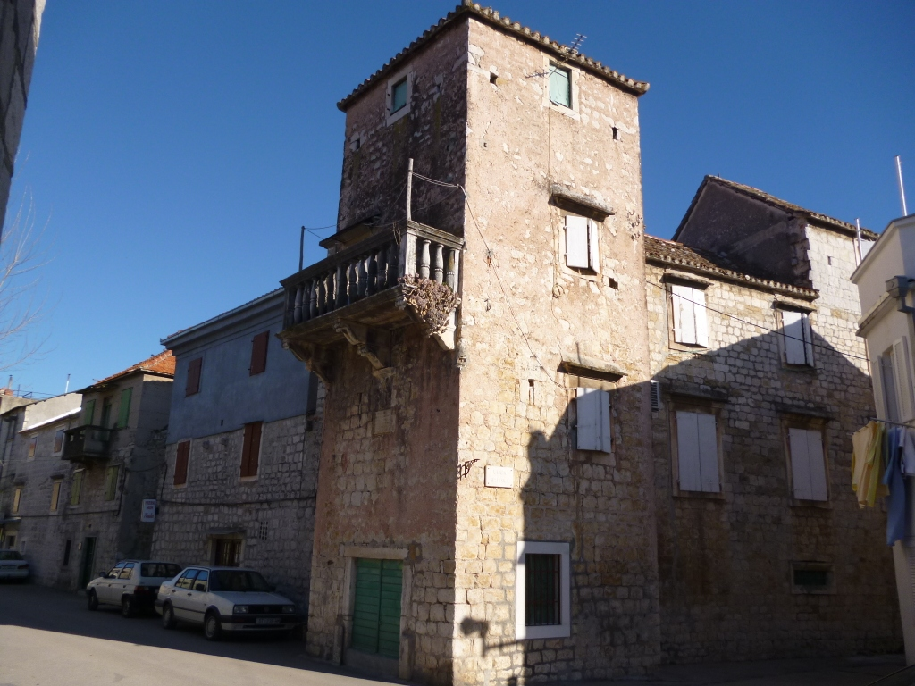 Kaštel Ferro u Kaštel Štafiliću